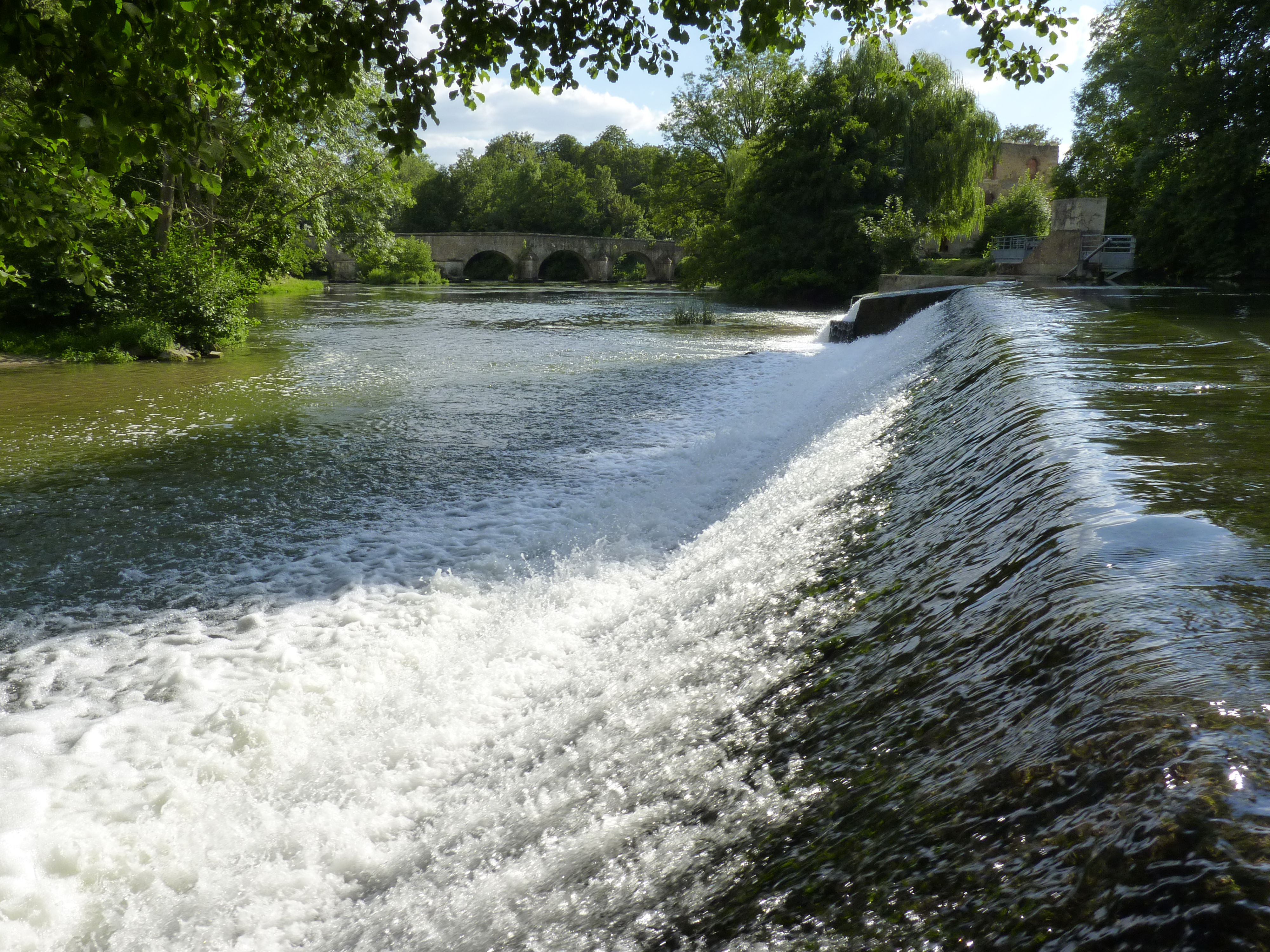 Sarthe - Montfort-le-Gesnois - Pont romain et vieux moulin